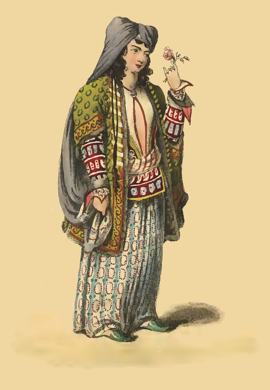 Persian girl